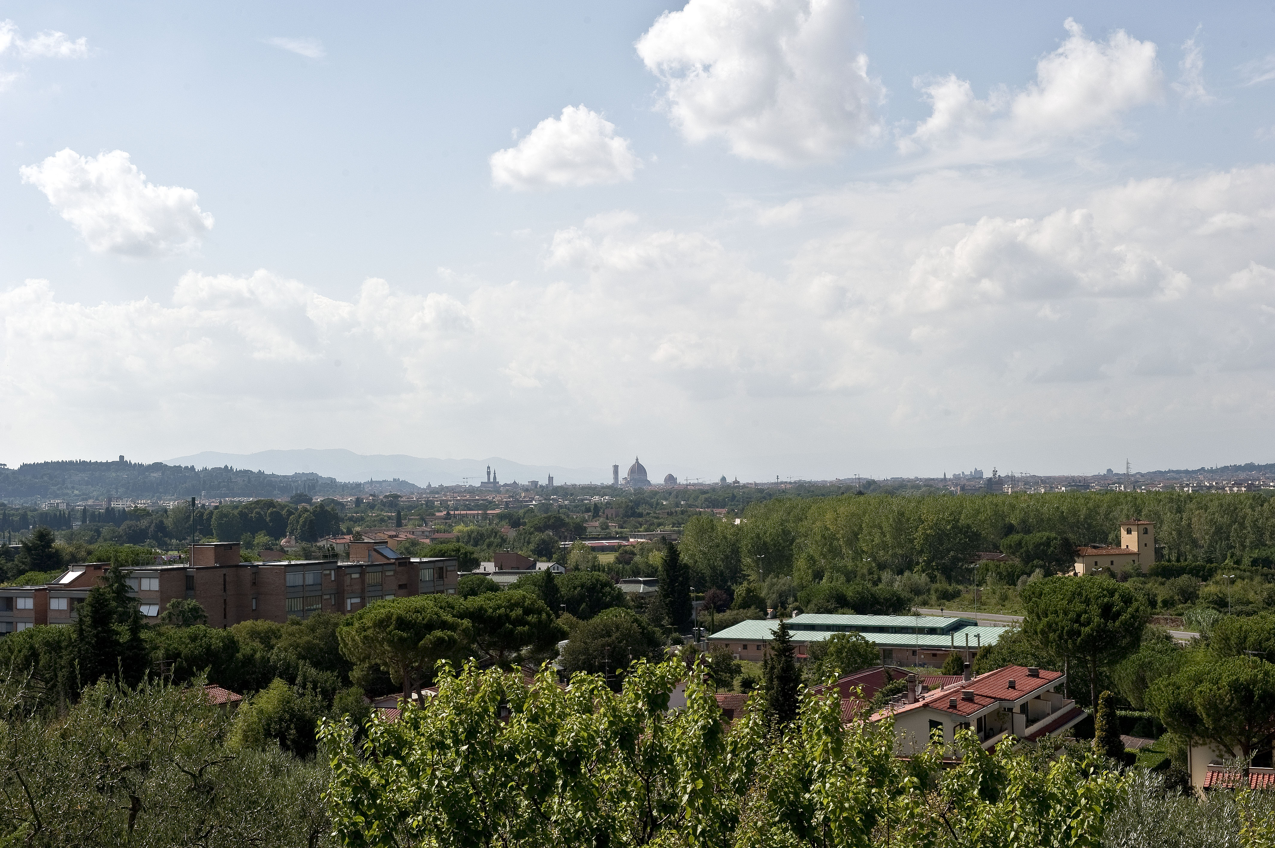 Panorama di Firenze visto dalla chiesa di santa Maria a Quarto (Bagno a Ripoli)